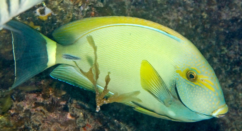 A. grammoptilus en Dampier, Australia